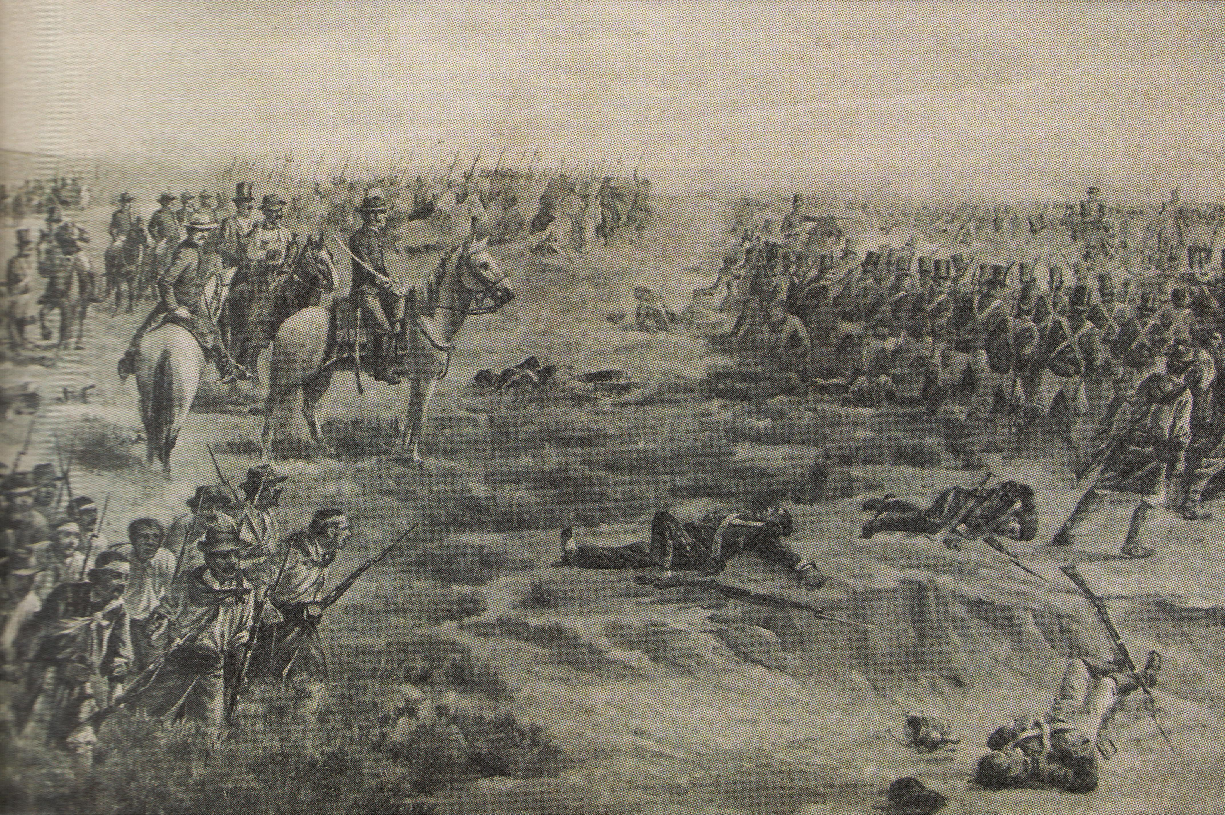 Batalla de Las Piedras (boceto, óleo sobre tela)